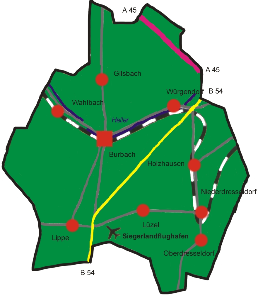 Eigene Zeichnung von Schumir